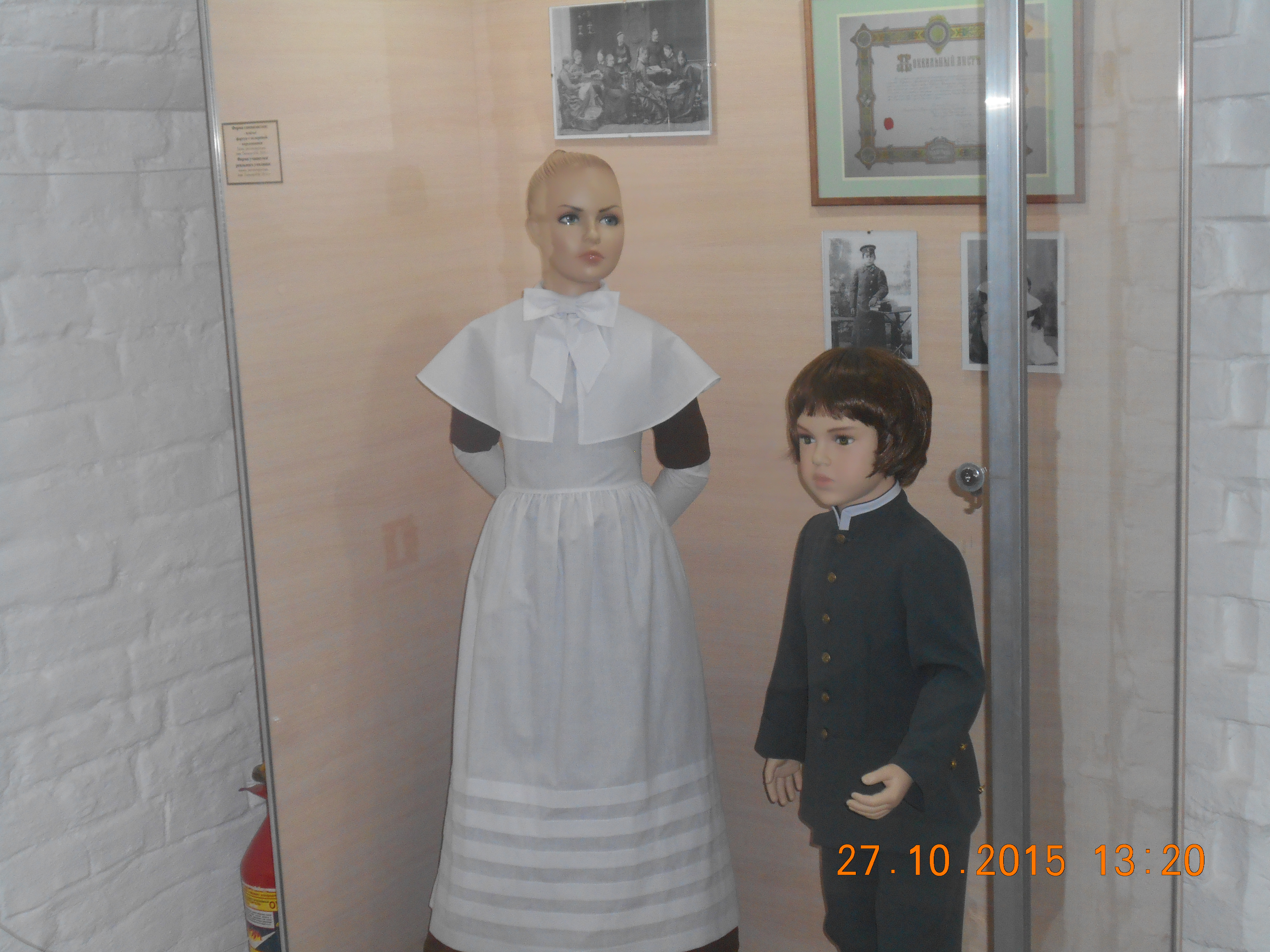 В музее. Станица Старочеркасская, Ростовская область.